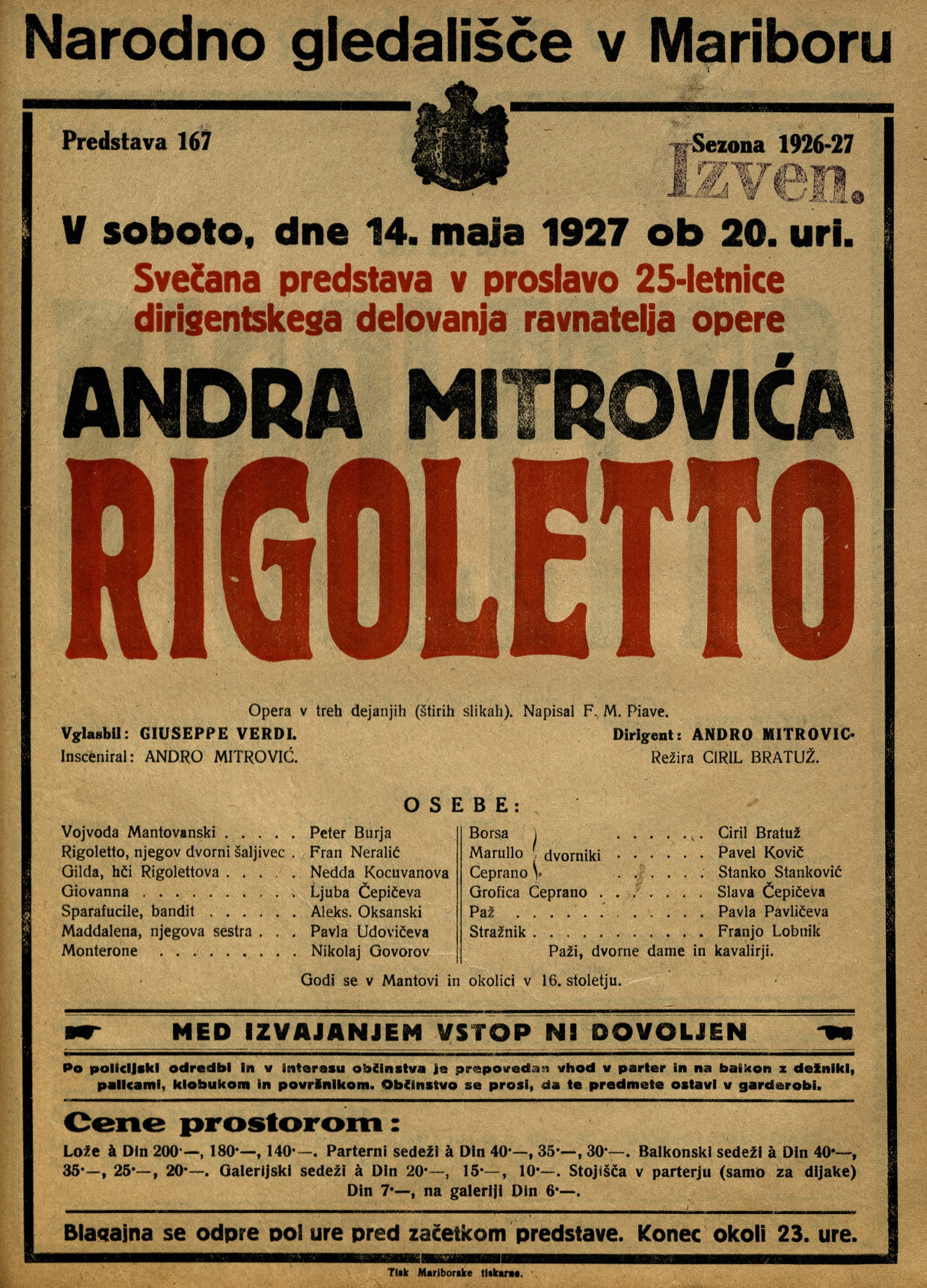 Plakat za predstavo Rigoletto v Narodnem gledališču v Mariboru.